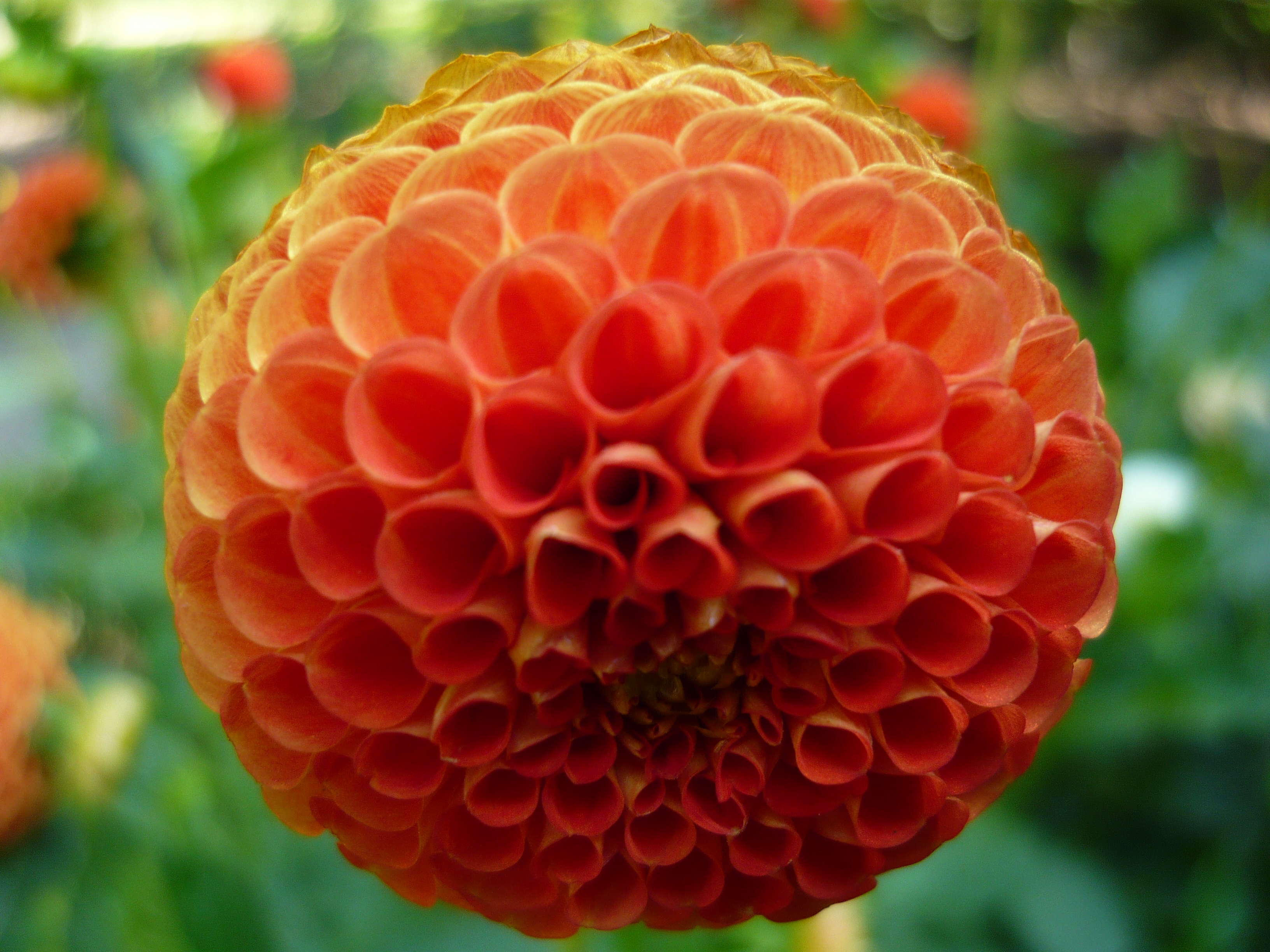 Dahlia 'Bantling'. Real Jardín Botánico de Madrid.